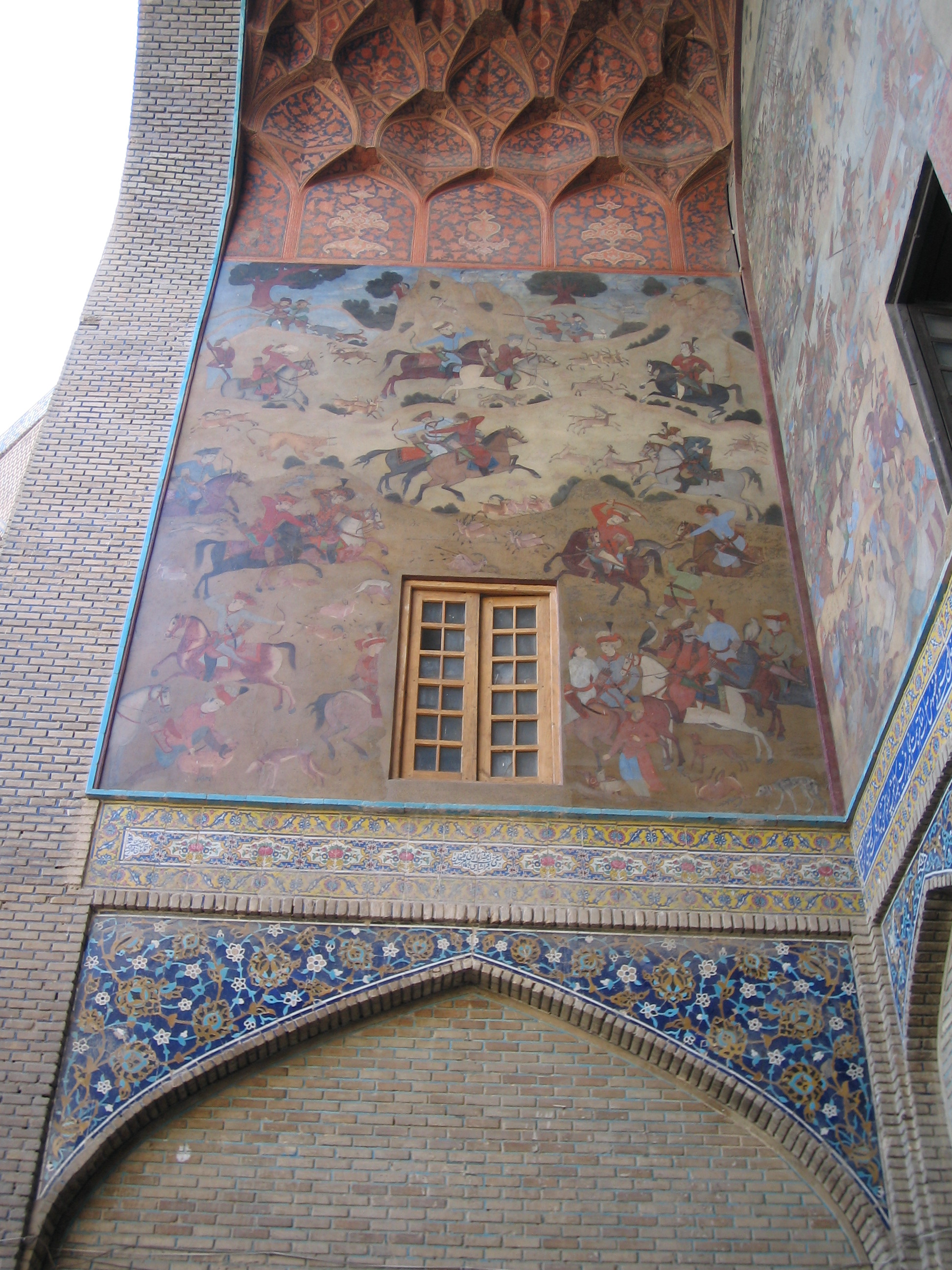 Portal of Gheysarieh Bazaar, Isfahan, Iran سردر بازار قیصریه، اصفهان، ایران